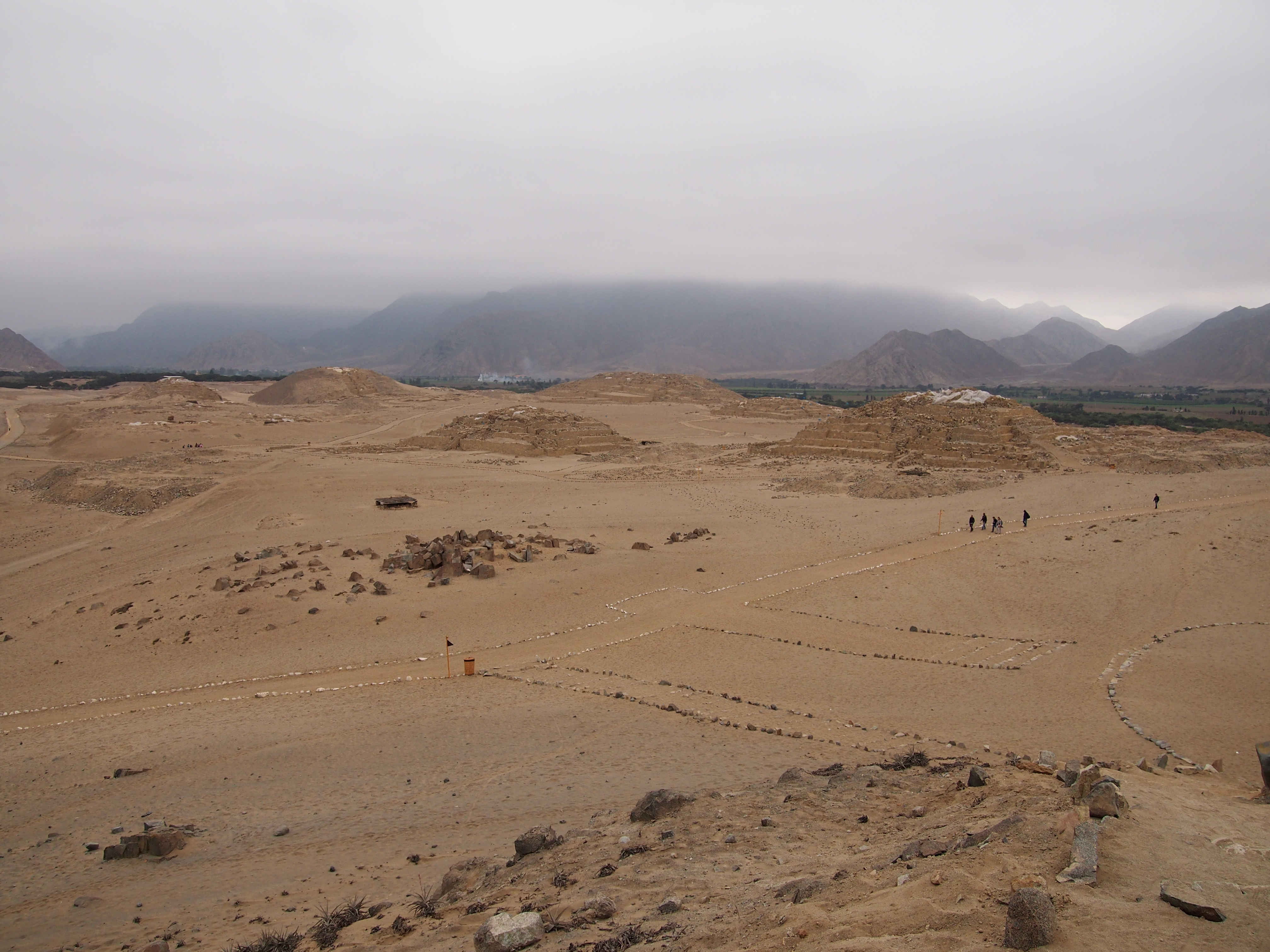 Una vista de la Ciudad Sagrada de Caral. Caral-Supe, Perú